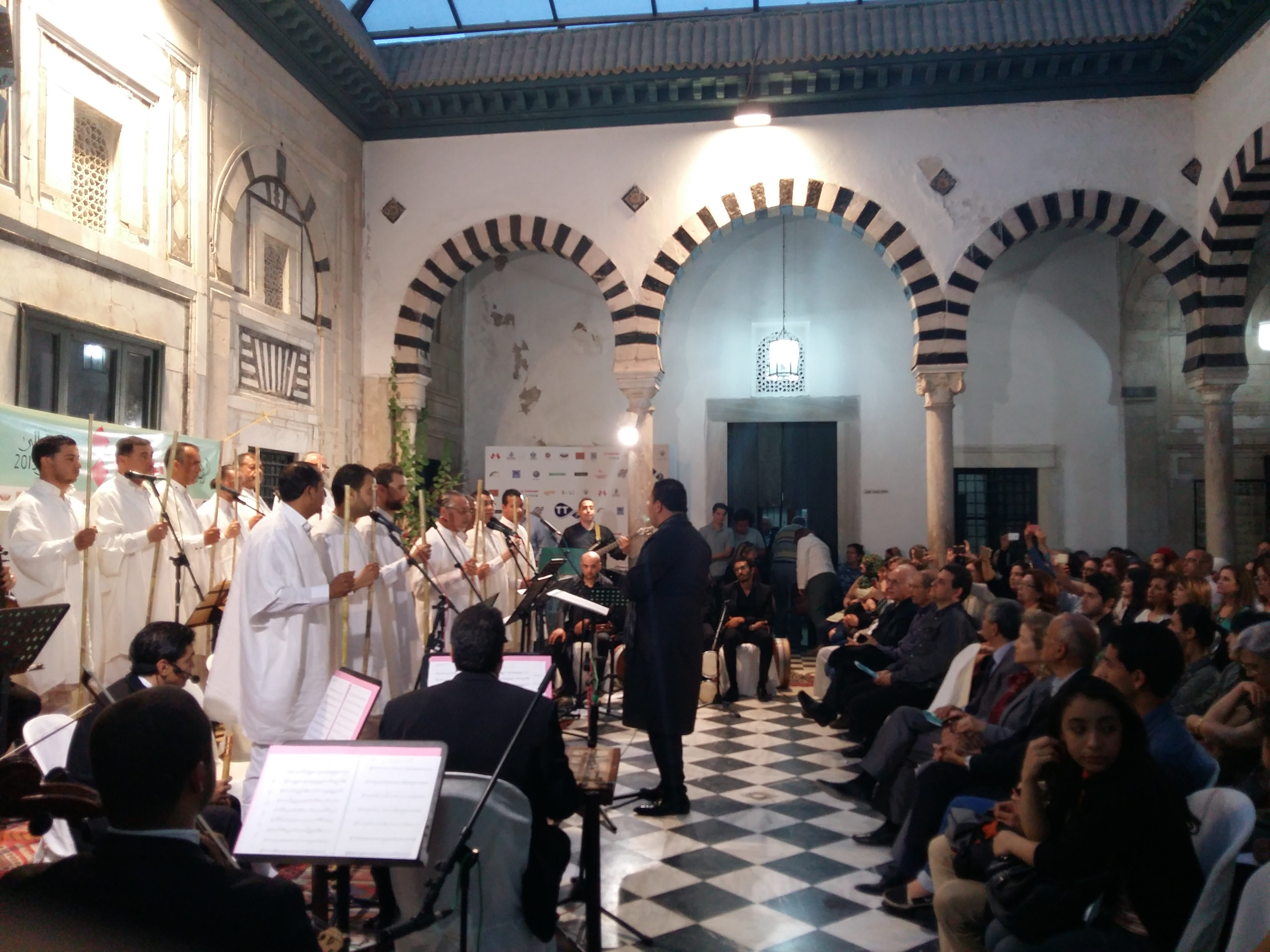 Rachidia Tunis This is an image of Cultural Fashion or Adornment from Tunisia